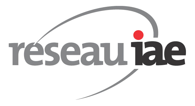 réseau des IAE